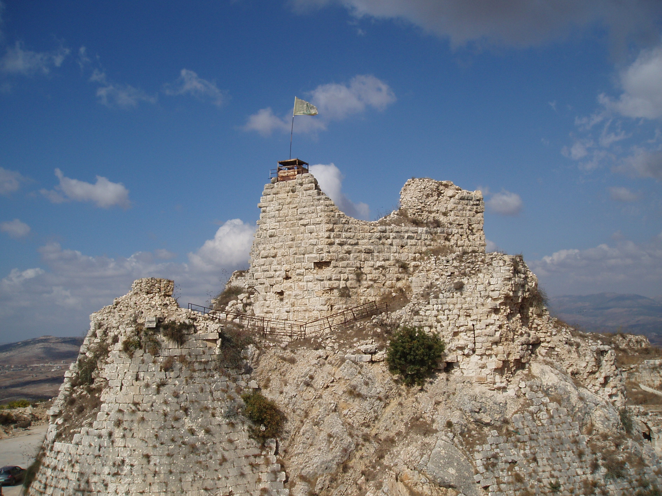 Chateau de Beaufort, Liban